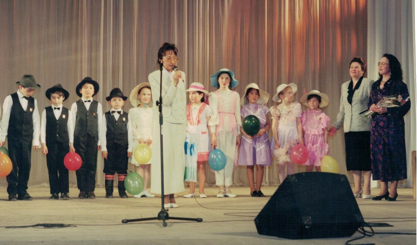 Творческий вечер Гузаль Ситдыковой и Расимы Ураксиной. Детский коллектив г. Сибая в Уфе